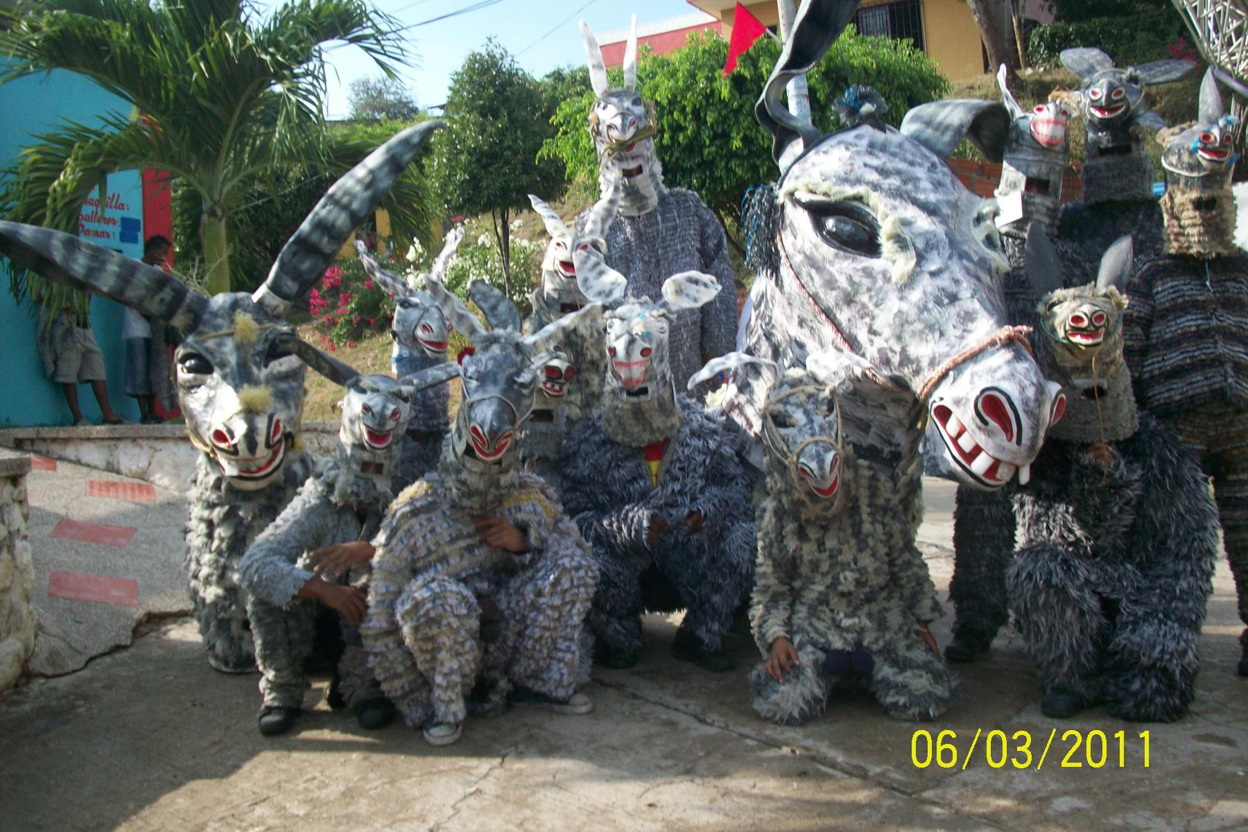 El Burro Corcoveón, disfraz colectivo, fotografía tomada en Usiacurí